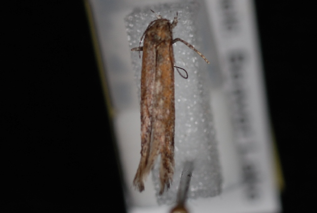 Gnorimoschema albimarginella